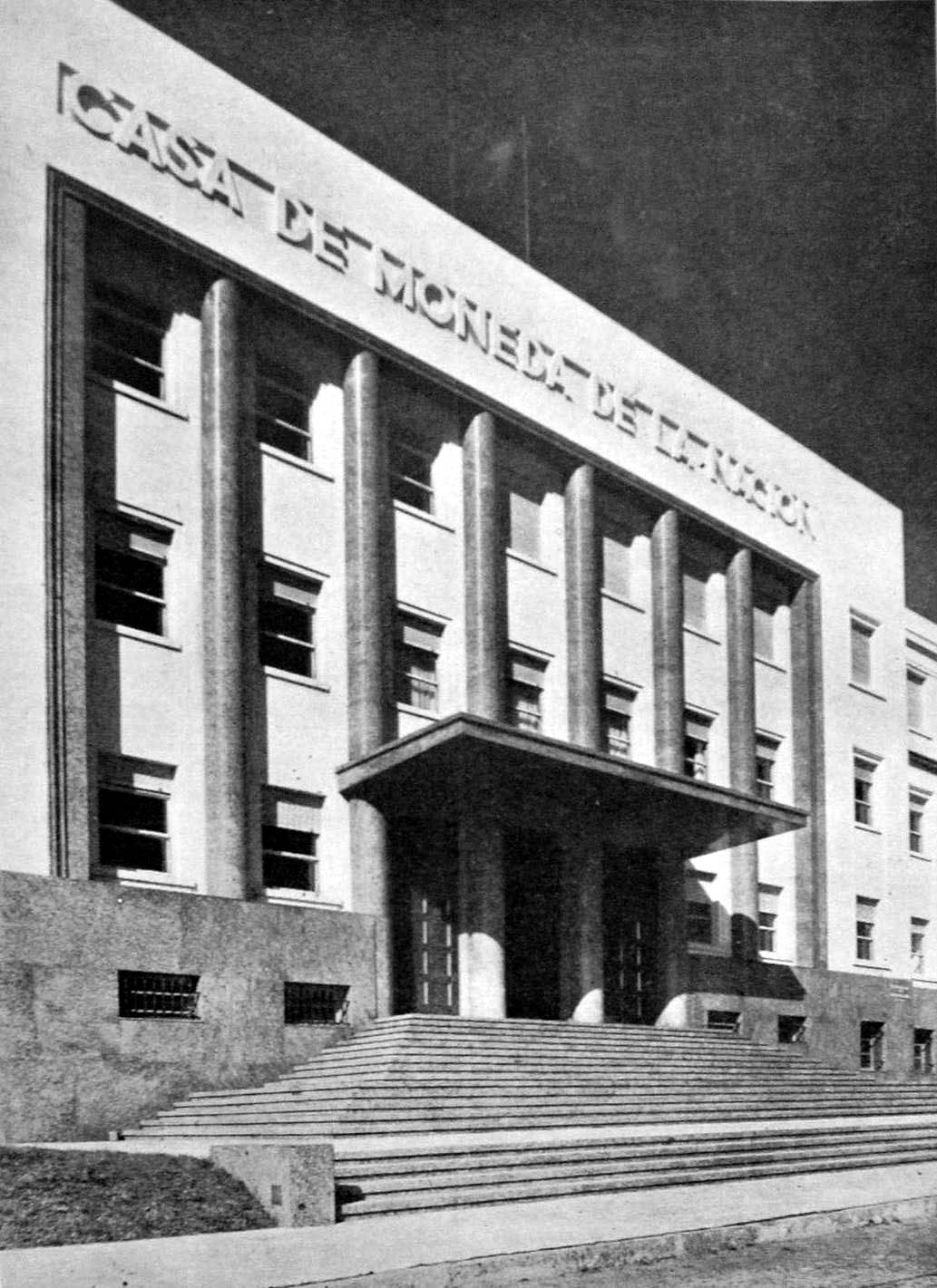 Fachada y escalinata de acceso a la Casa de Moneda de la Nación Argentina. Edificio racionalista proyectado por los arquitectos Quinke, Nin Mitchell y Chute en 1939. Buenos Aires, Argentina